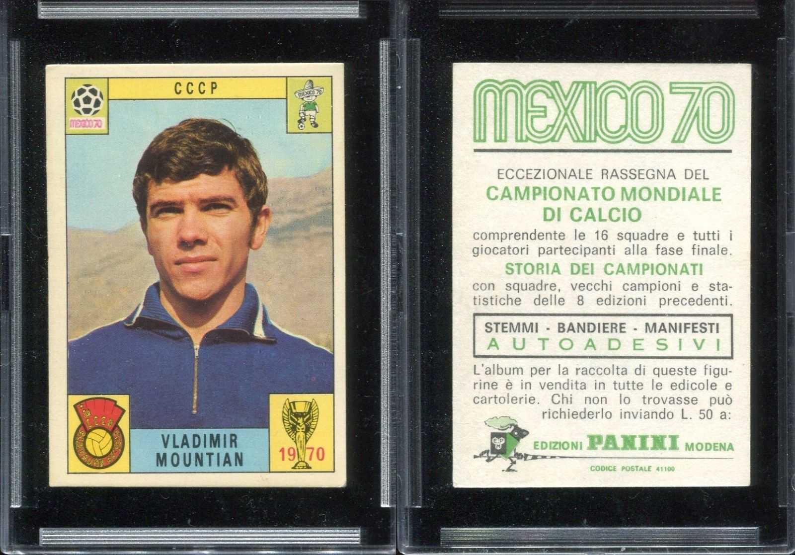 MEXICO 70 1970 CCCP VLADIMIR MOUNTIAN Figurina Calciatori Panini